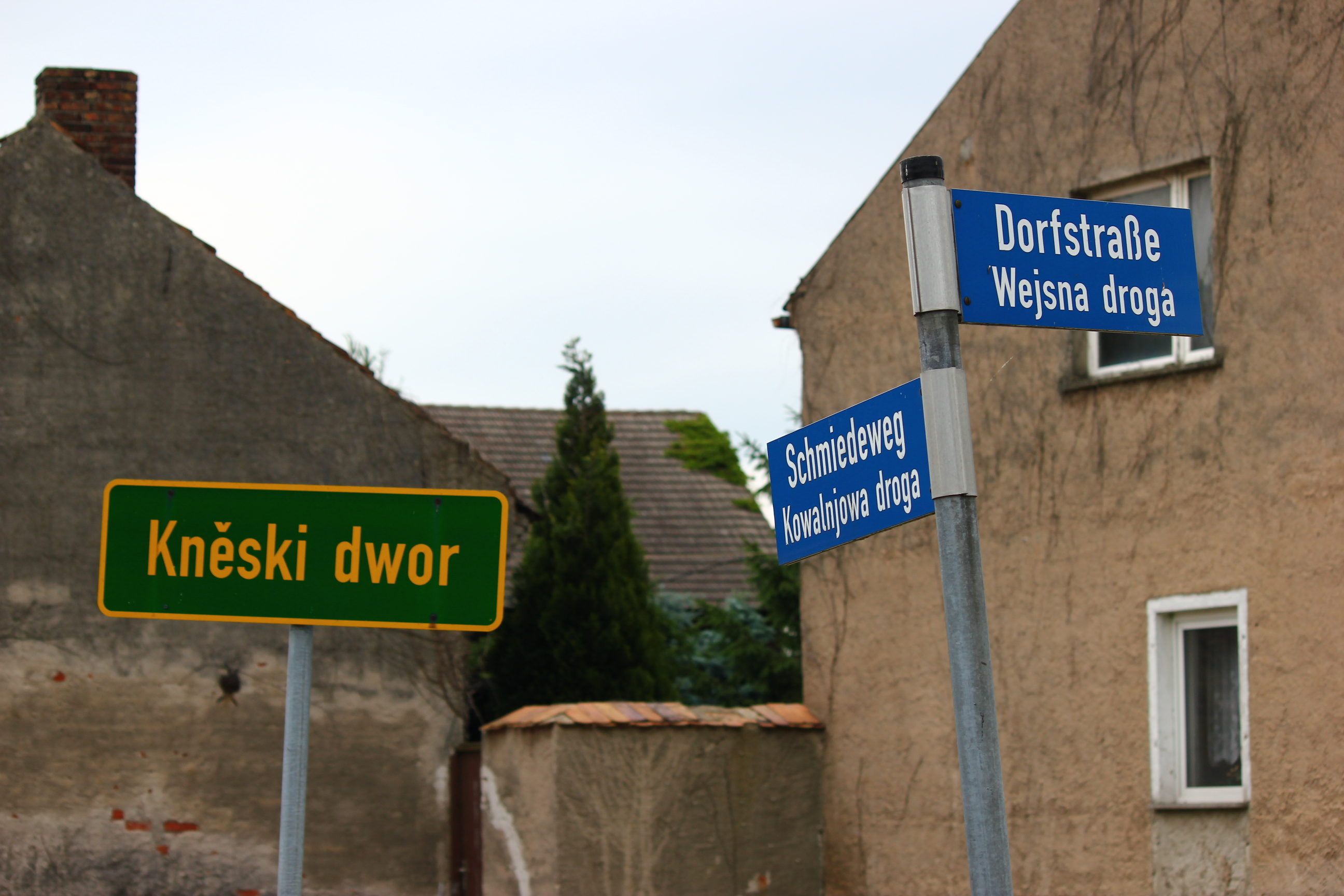 Niedersorbisches Ortsteilschild in Dissen/Dešno, Landkreis Spree-Neiße, Brandenburg. Hornjoserbsce: Delnjoserbski napis na tafli w Dešnje, wokrjes Sprjewja-Nysa, Braniborska.